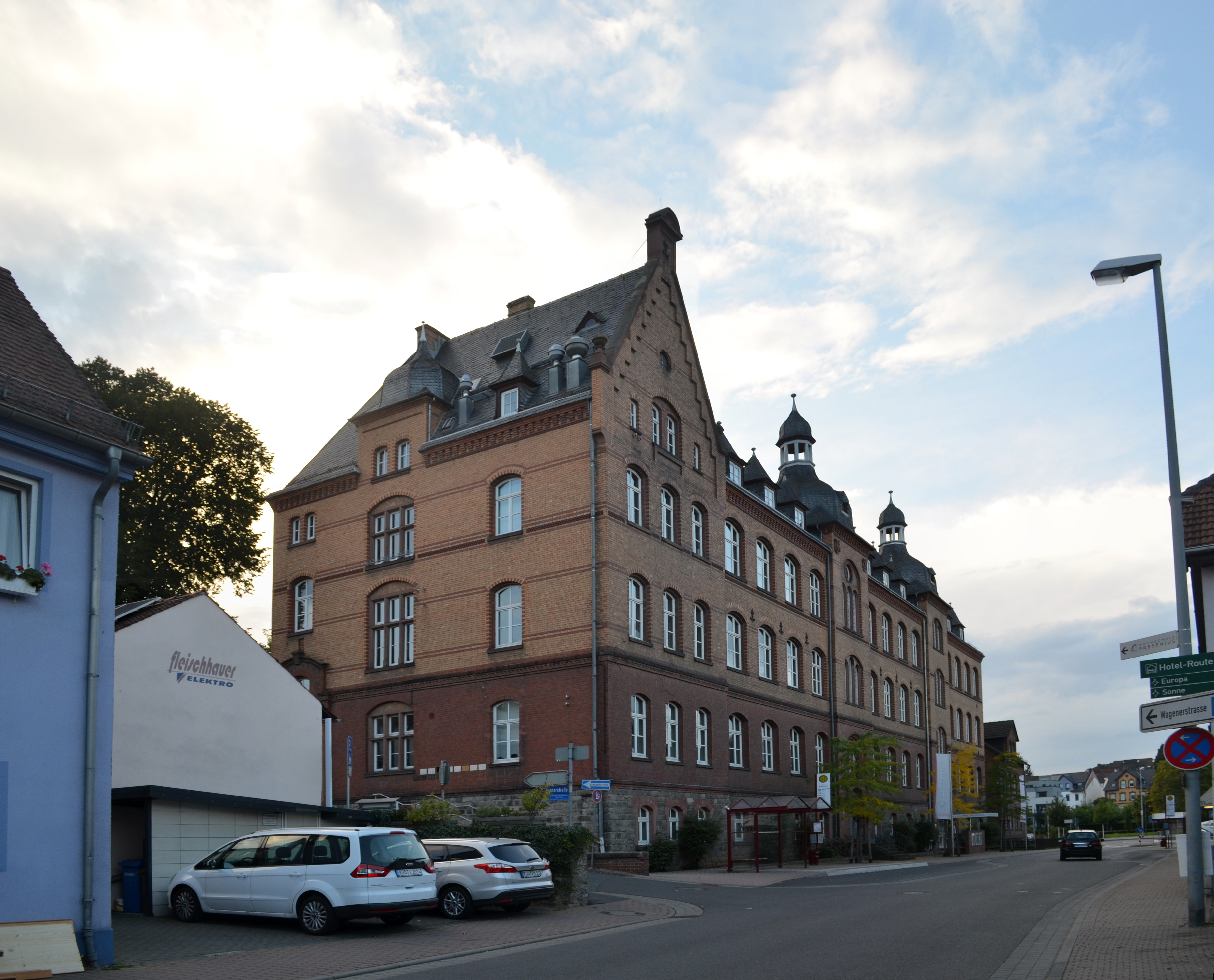 Idstein, Limburger Straße 2, Ehemalige Staatsbauschule, heute Teil der Fresenius Hochschule